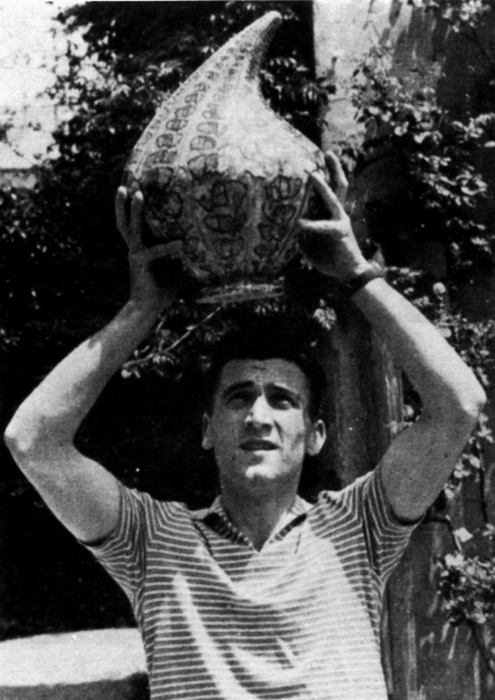 Carlo Zauli con l’opera vincitrice al Premio Faenza 1953 Foto: archivio Carlo Zauli (